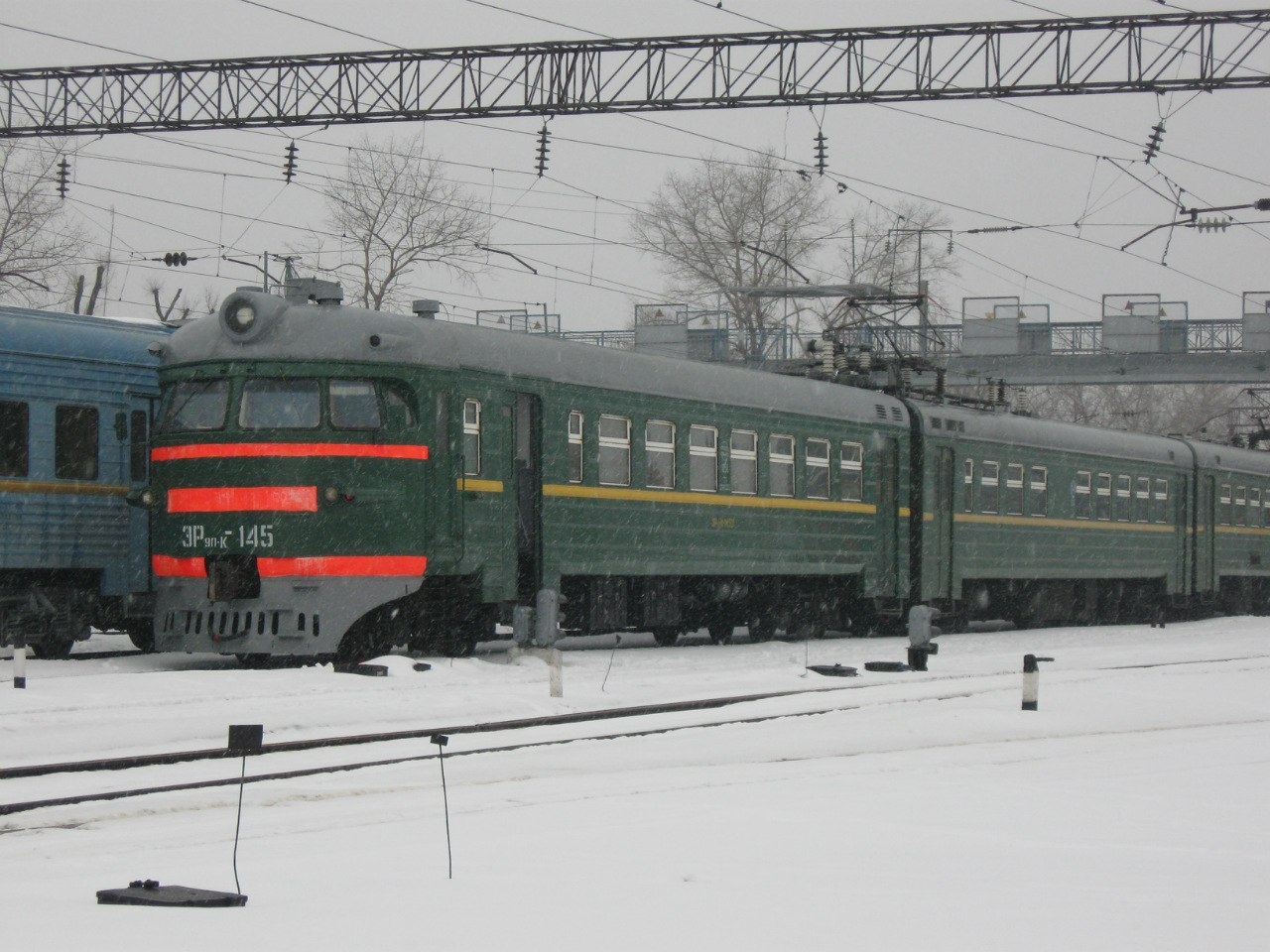 ЭР9п-К-145 в ТЧ-5 Отрожка Юго-Восточной железной дороги